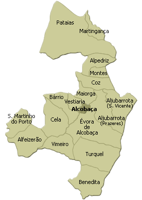 localisation de alcobaça sur la freguesia de alcobaça